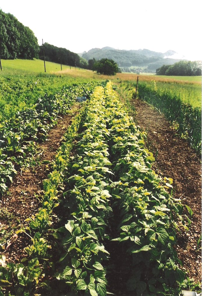 Ifenthal, SO., Schweiz: Hof Haselweid: Demeter-Gemüsegarten von Süden, im Hintergrund die Frohburg